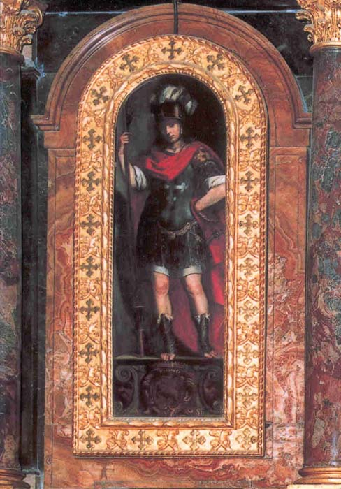 San Secondo Martire (+286 el il 306); tela dell'altare di San Secondo nel Duomo di Torino ([1])